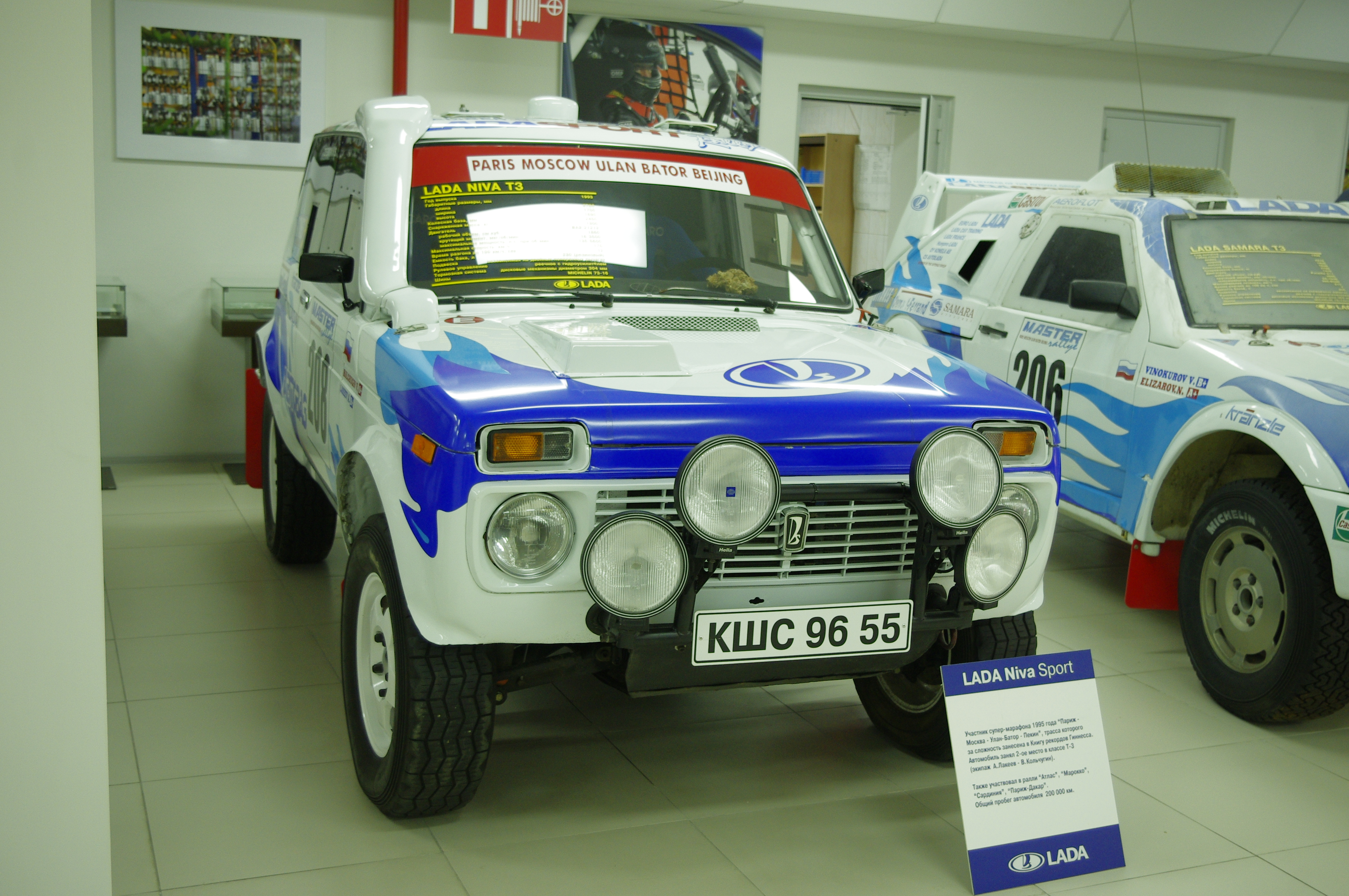 Lato 2013.